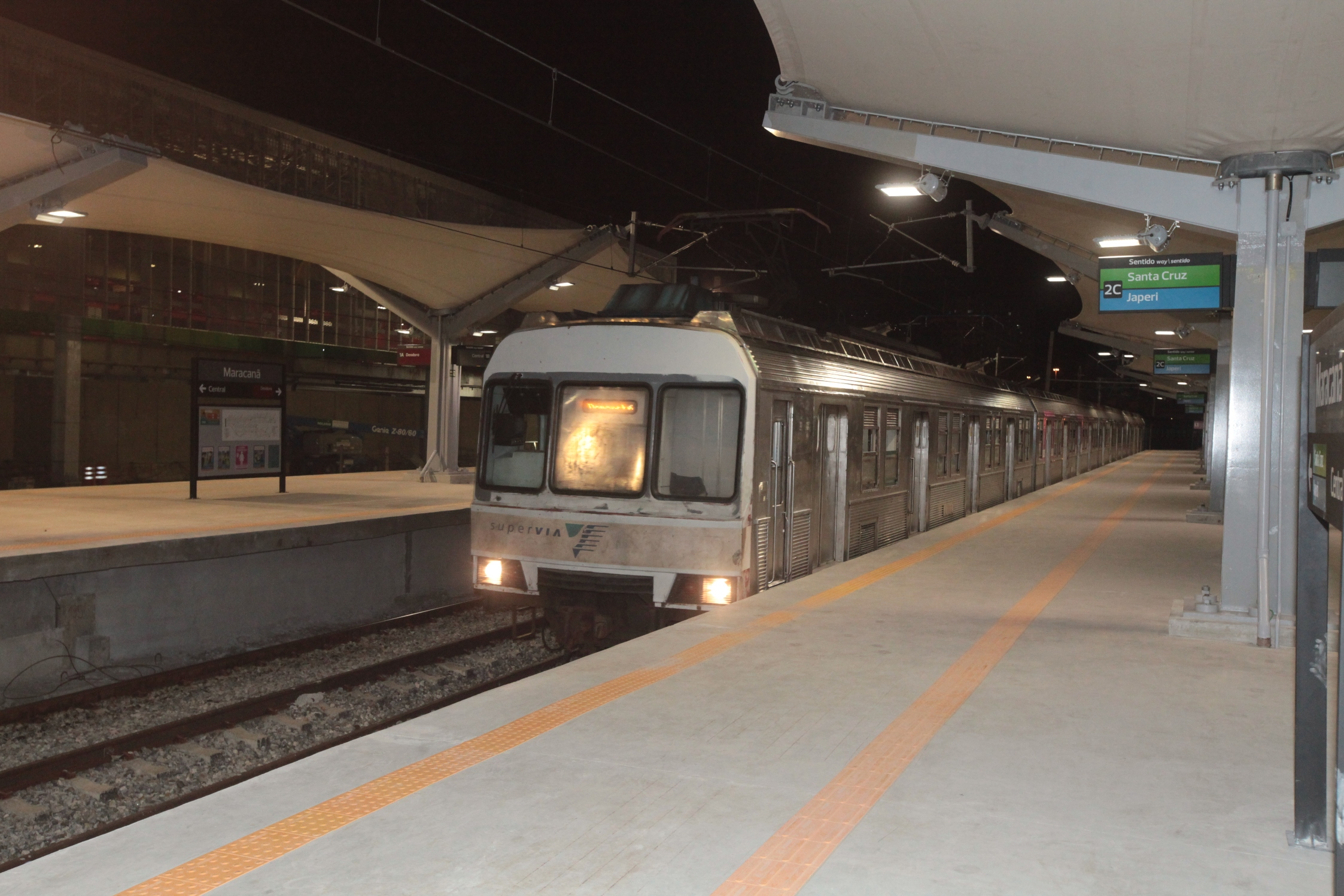 Trem série 9000 estacionado na plataforma da Estação Maracanã.